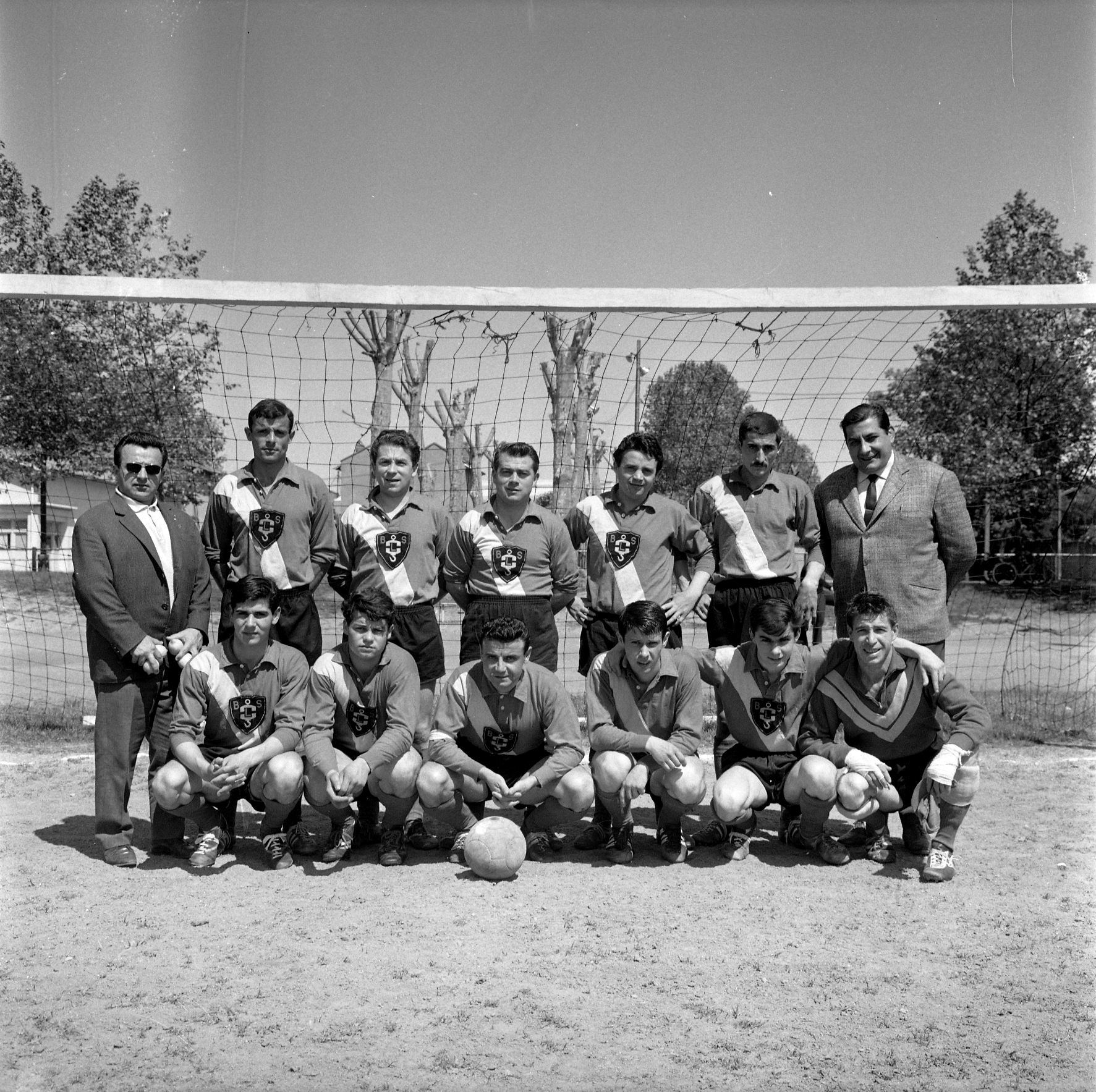 25 mai 1963. Photo de groupe de l'équipe de football "Buzzichelli Levage Sports". Debout à droite Lilian Buzzichelli (industriel directeur de Buzzichelli Levage).